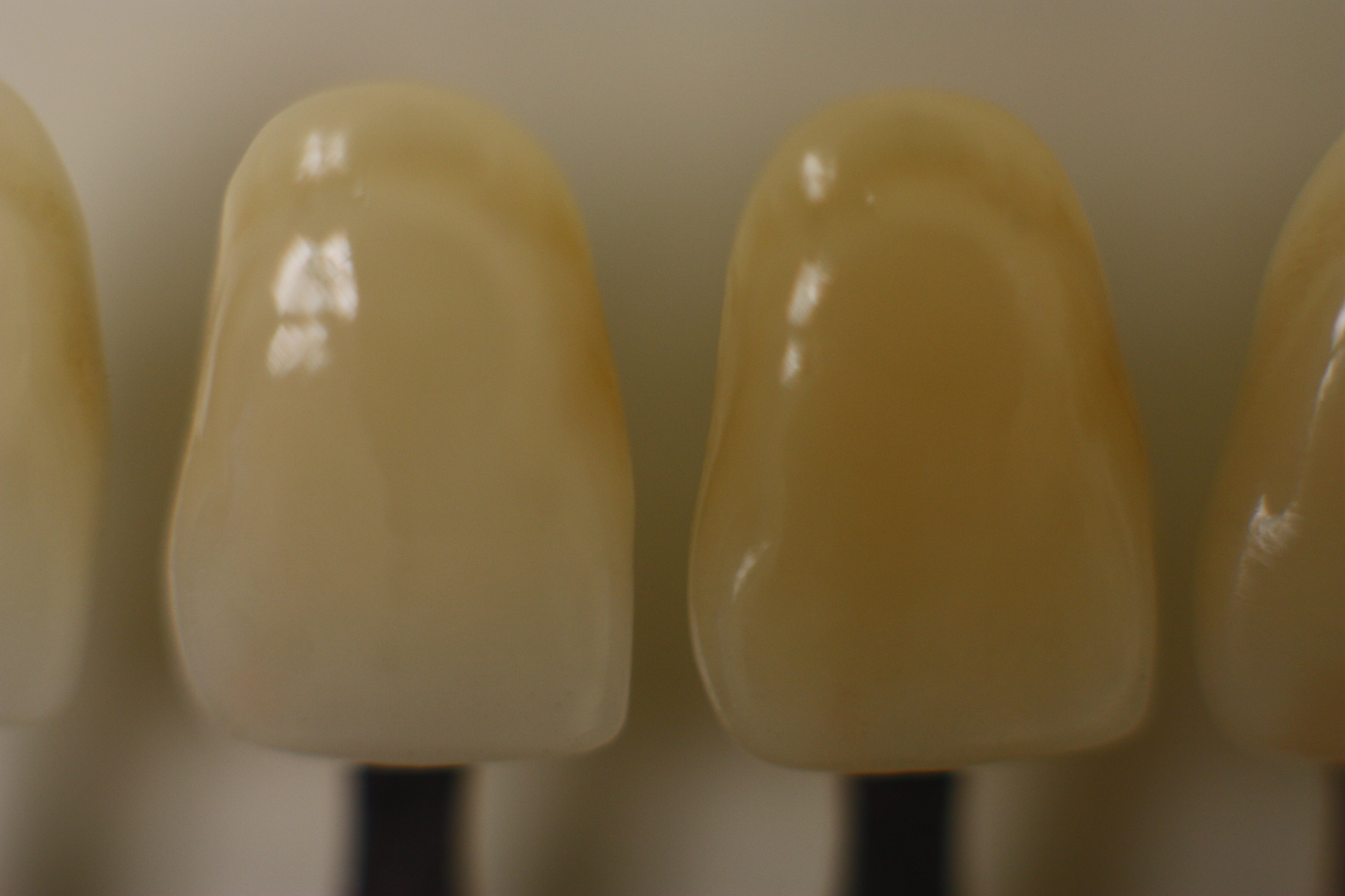 Zahnfarbe Frabring, Zahnfarbbestimmung, Bio-Farbring, VITA-Farbring, Farbring für Composits